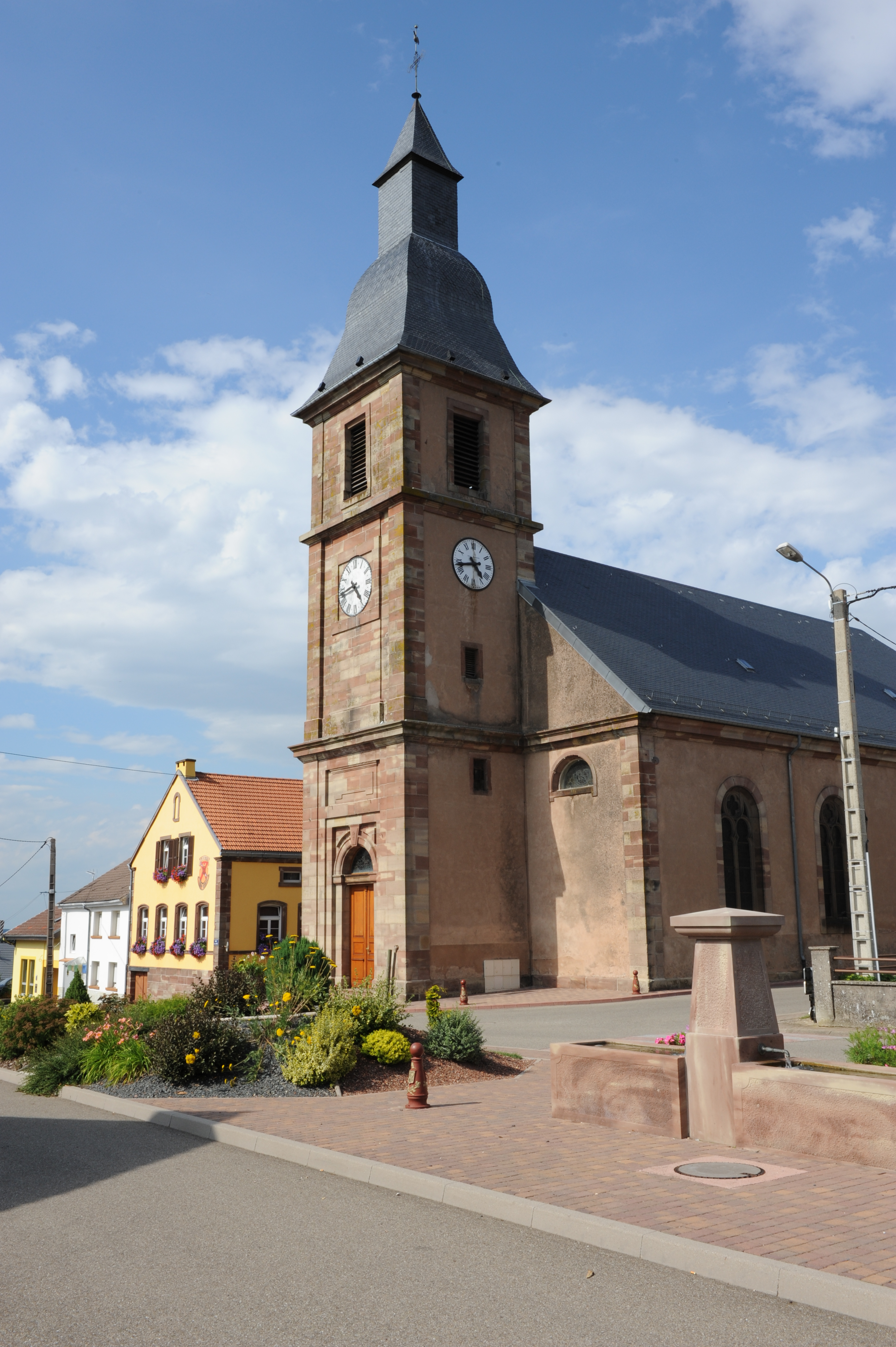 Eglise